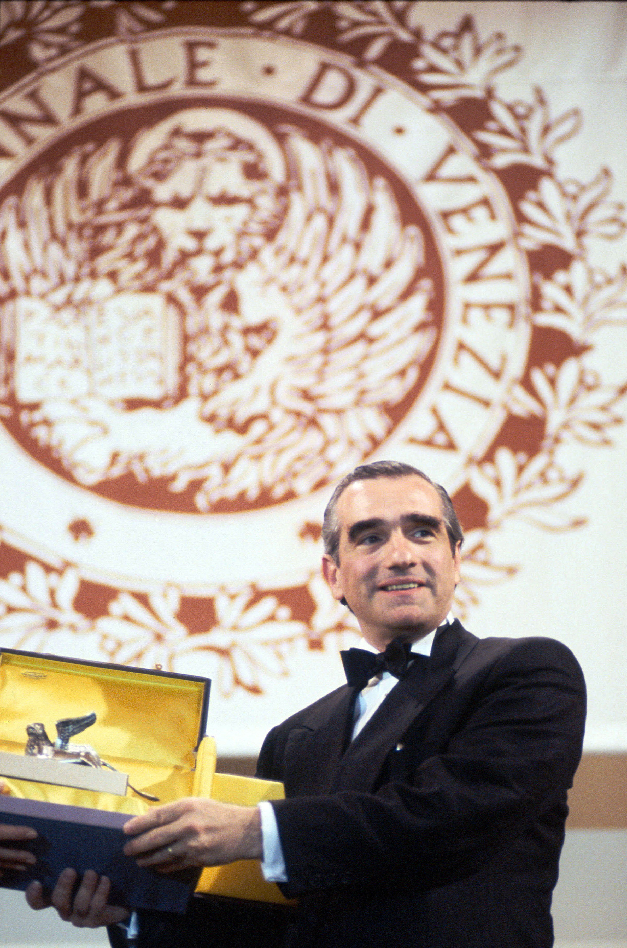 Il regista Martin Scorsese riceve il Leone d'oro alla carriera alla Mostra del Cinema di Venezia del 1995